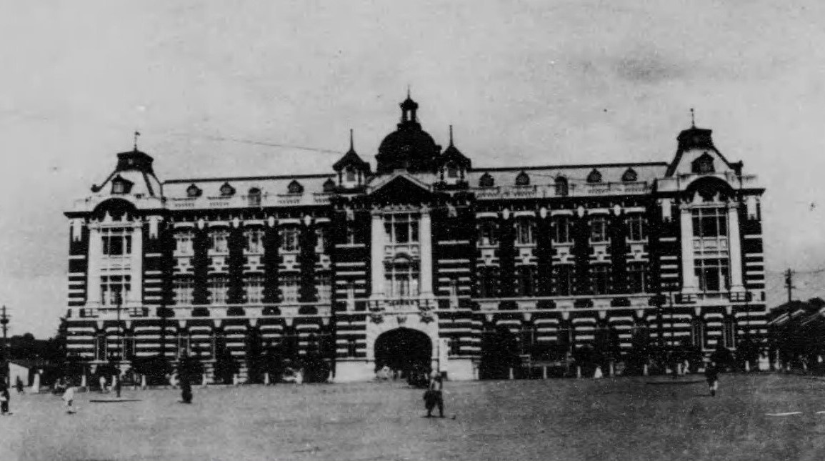 京城郵便局 朝鮮写真帖 (朝鮮総督府, 1921)